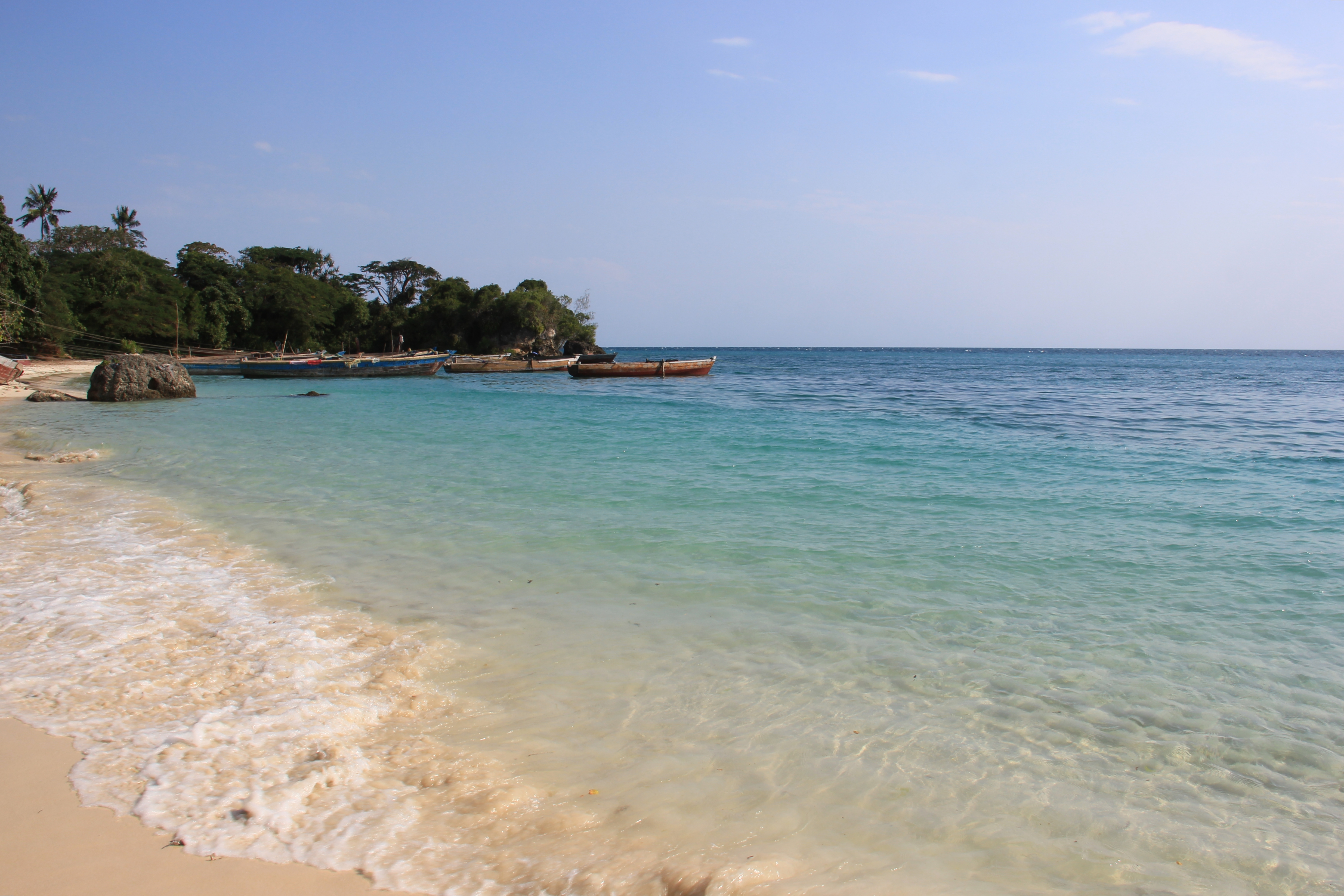 Mangapwani Beach